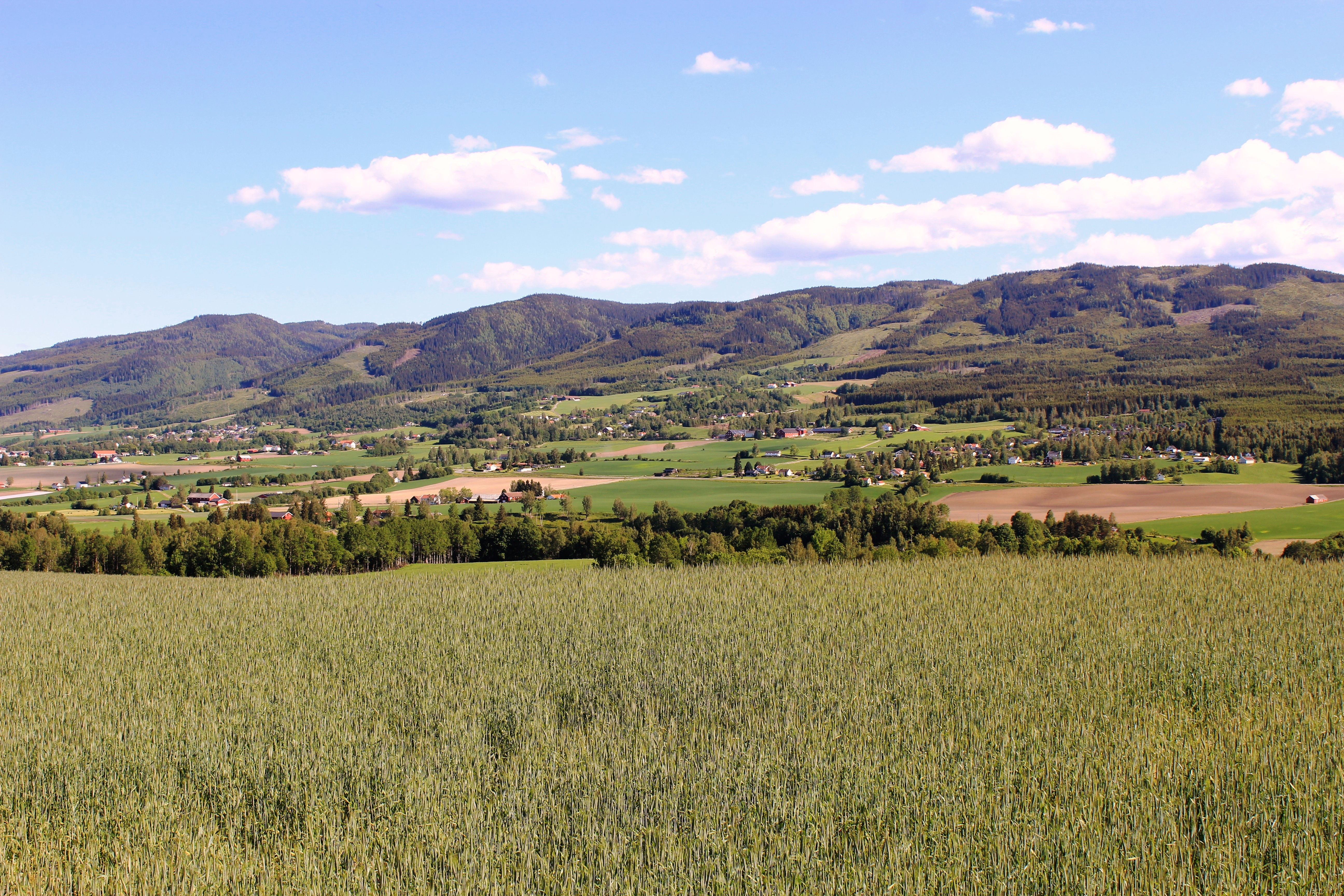 Totenvika med Totenåsen og bekkedaler